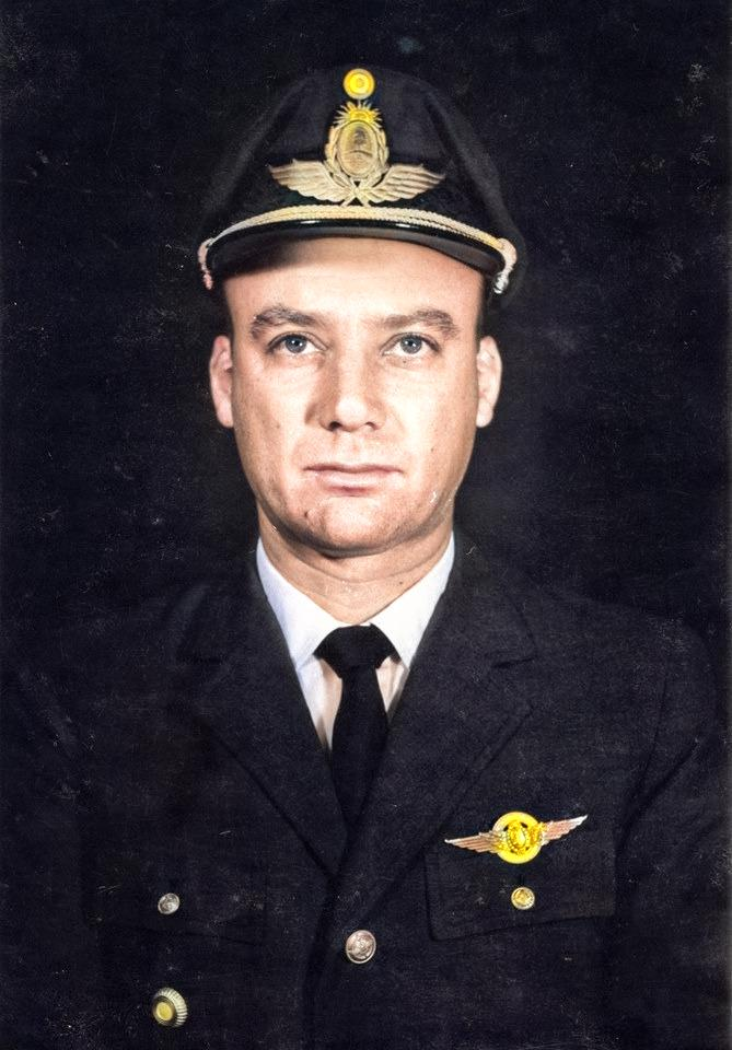 Augusto Jorge Hughes (1931-1993) comandante en jefe de la Fuerza Aérea de Argentina. Foto colorizada.